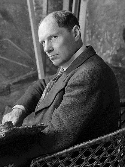 De schilder Jóhannes Sveinsson Kjarval aan het werk in zijn atelier 1934